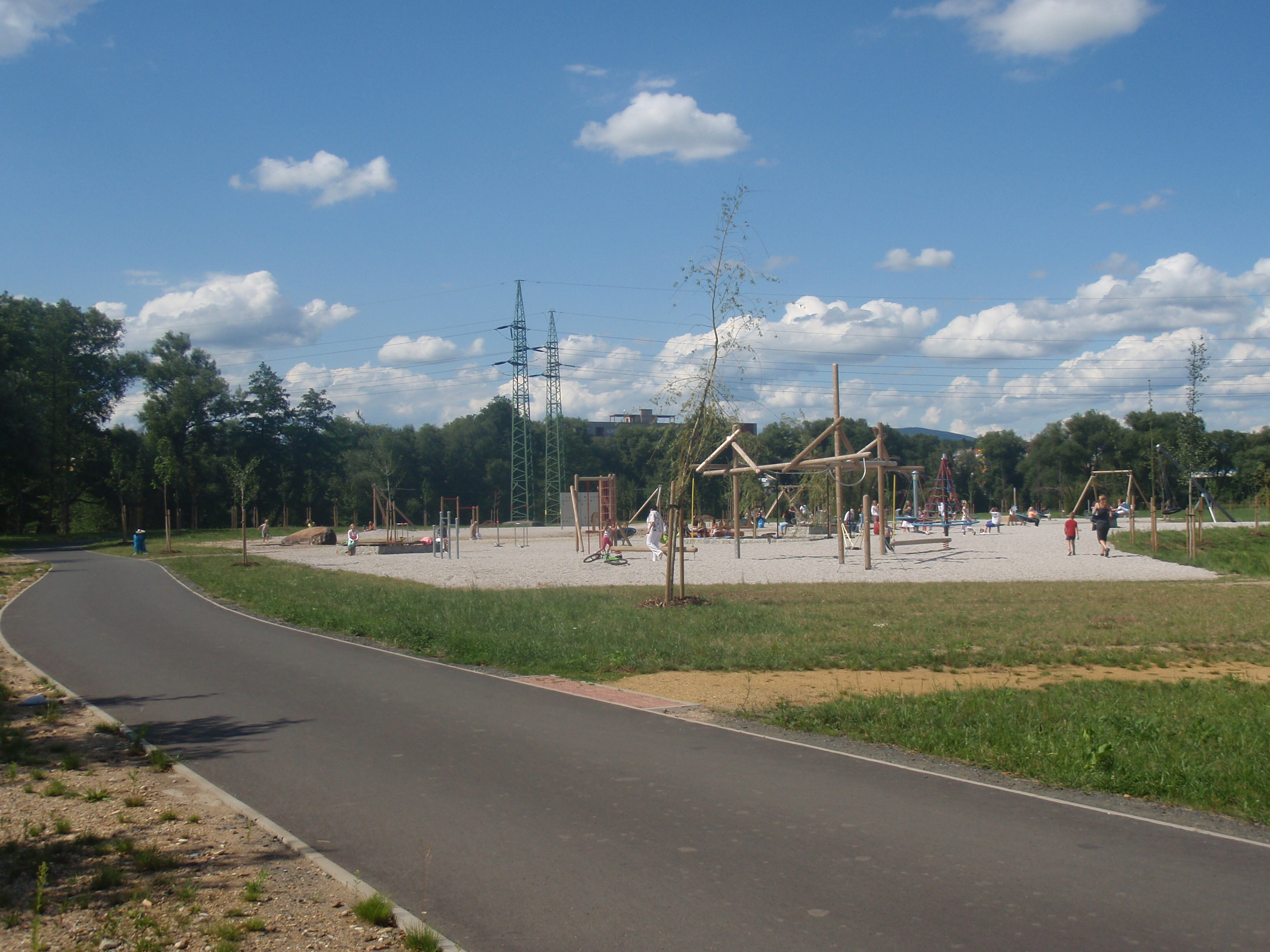 Park Meandr Ohře v Karlových Varech - Tuhnice